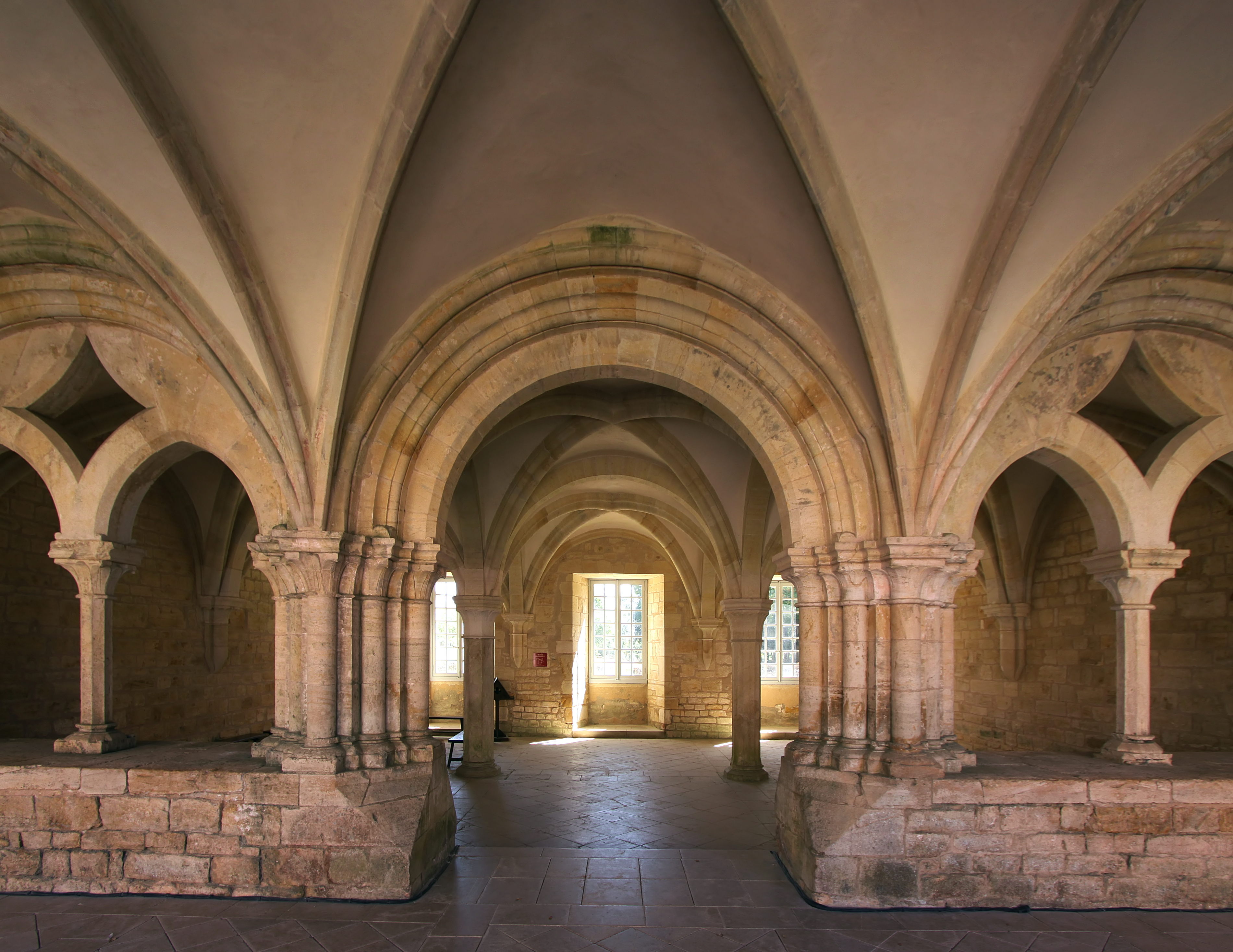 Kapitelsaal des Zisterzienserklosters Noirlac im französischen Département Cher